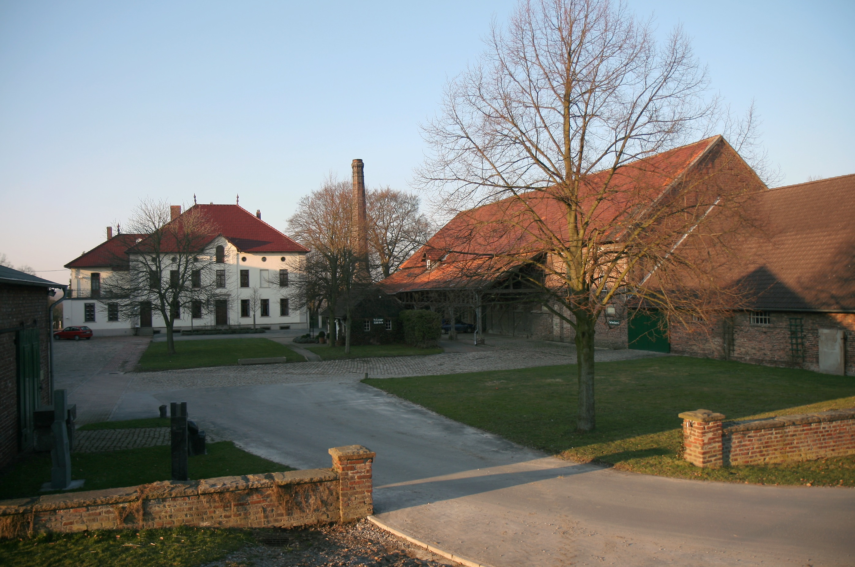 Gut Lenninghausen (Gutsbrennerei Bimberg) in Iserlohn-Drüpplingsen, Lenninghauser Weg 1. Unter Denkmalschutz seit 20. August 1991.